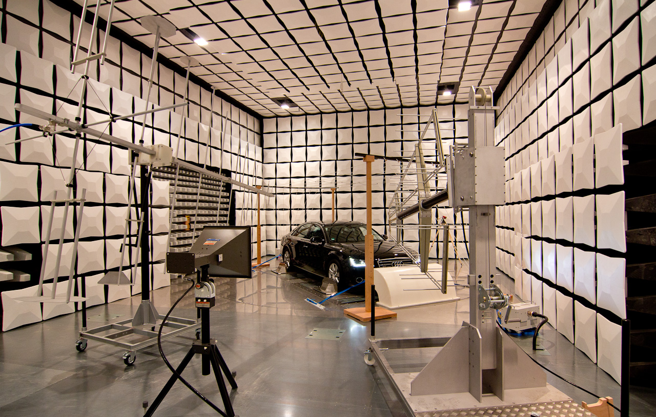 Im EMV-Labor der Westsächsischen Hochschule Zwickau werden Kraftfahrzeuge auf elektromagnetische Verträglichkeit untersucht.